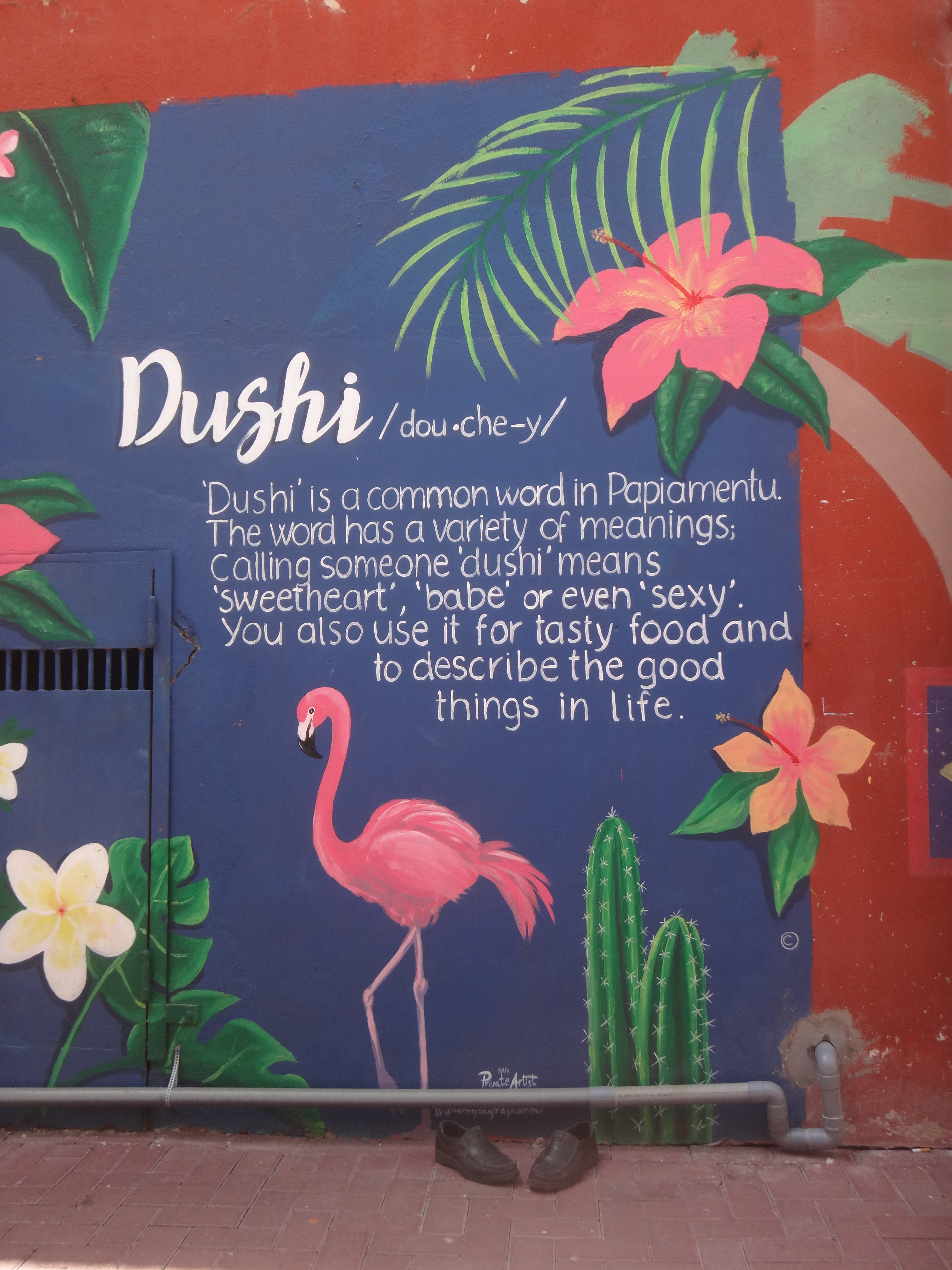 Painted by a local artist in a public street.